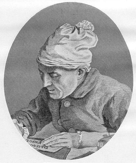 Philippe Brunck (1729–1803), französischer klassischer Philologe. Stich von P. J. B. Bradel (Kupferstichkabinett Straßburg).